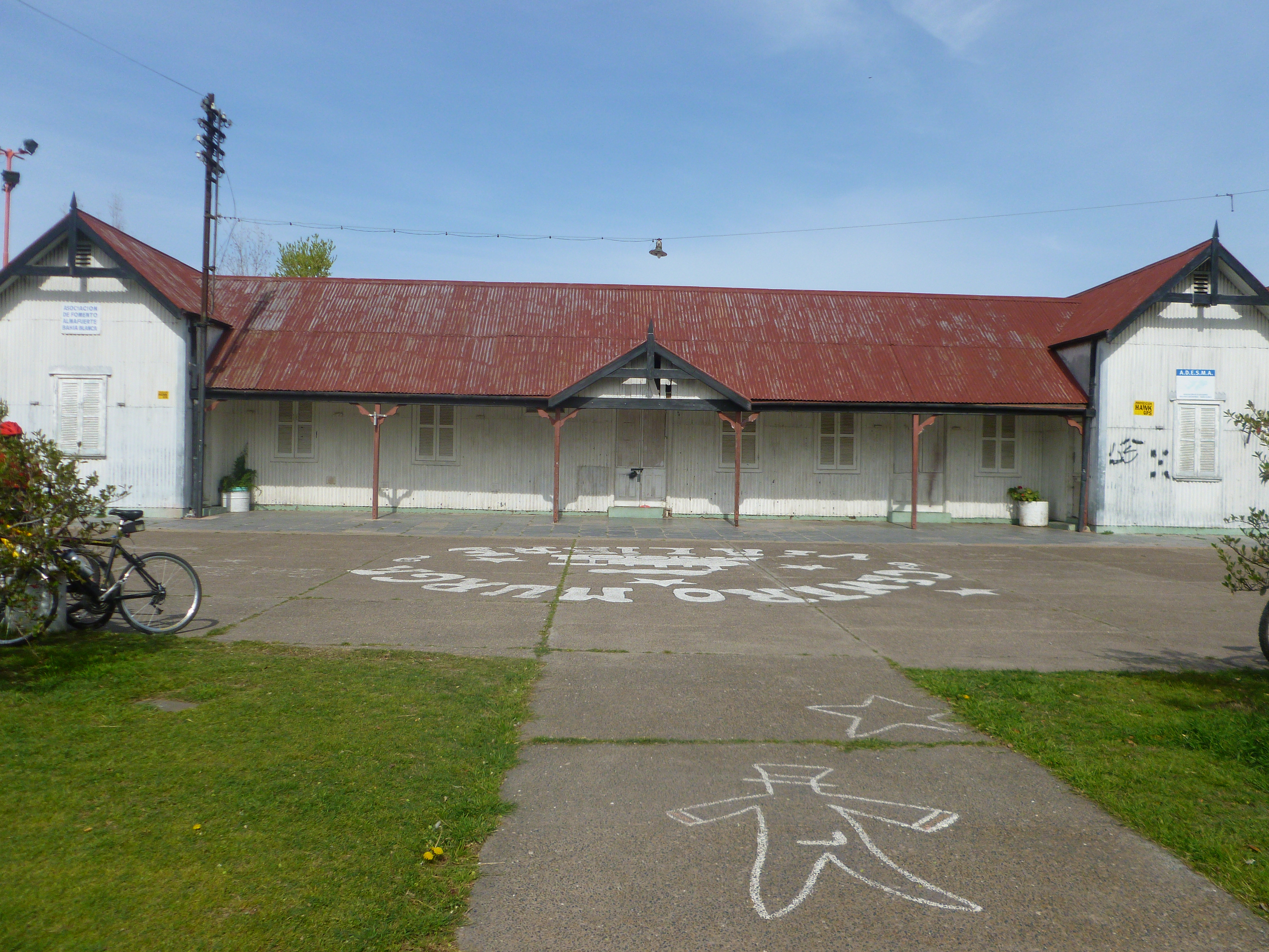 Estación férrea Bahía Blanca Noroeste